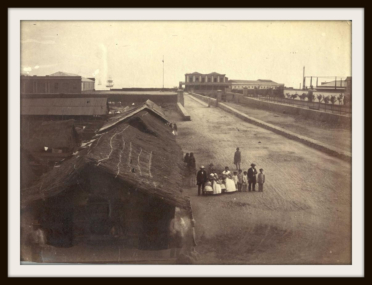 Estero Delicias a la derecha de la imagen, actualmente tapado por el bandejón central de la Avenida Argentina, foto de Rafael Castro del año 1864.